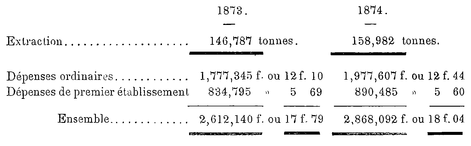 Prix de revient en 1873 et 1874 de la Compagnie des mines de Liévin.